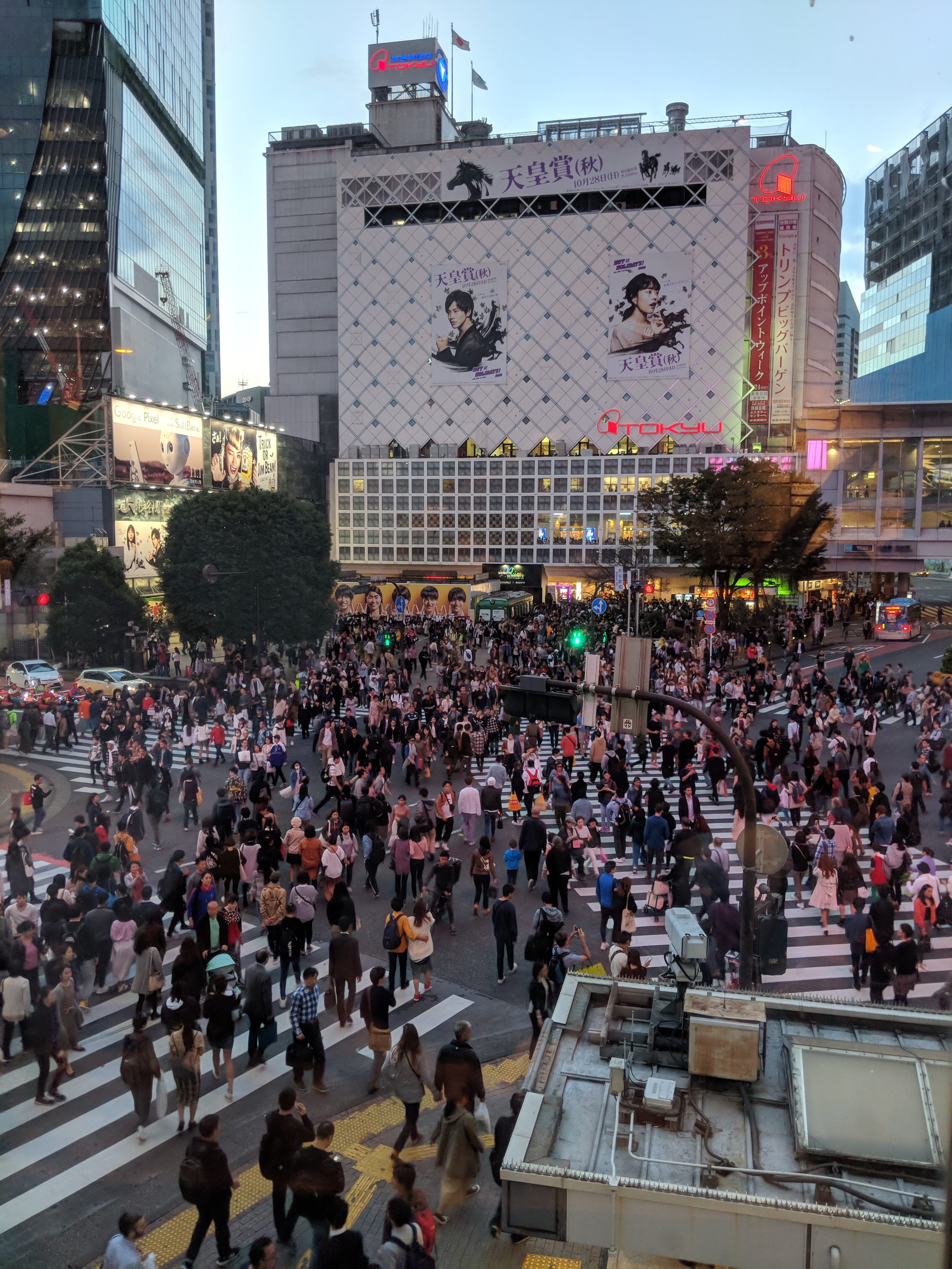 Japan Trip 2018 1761